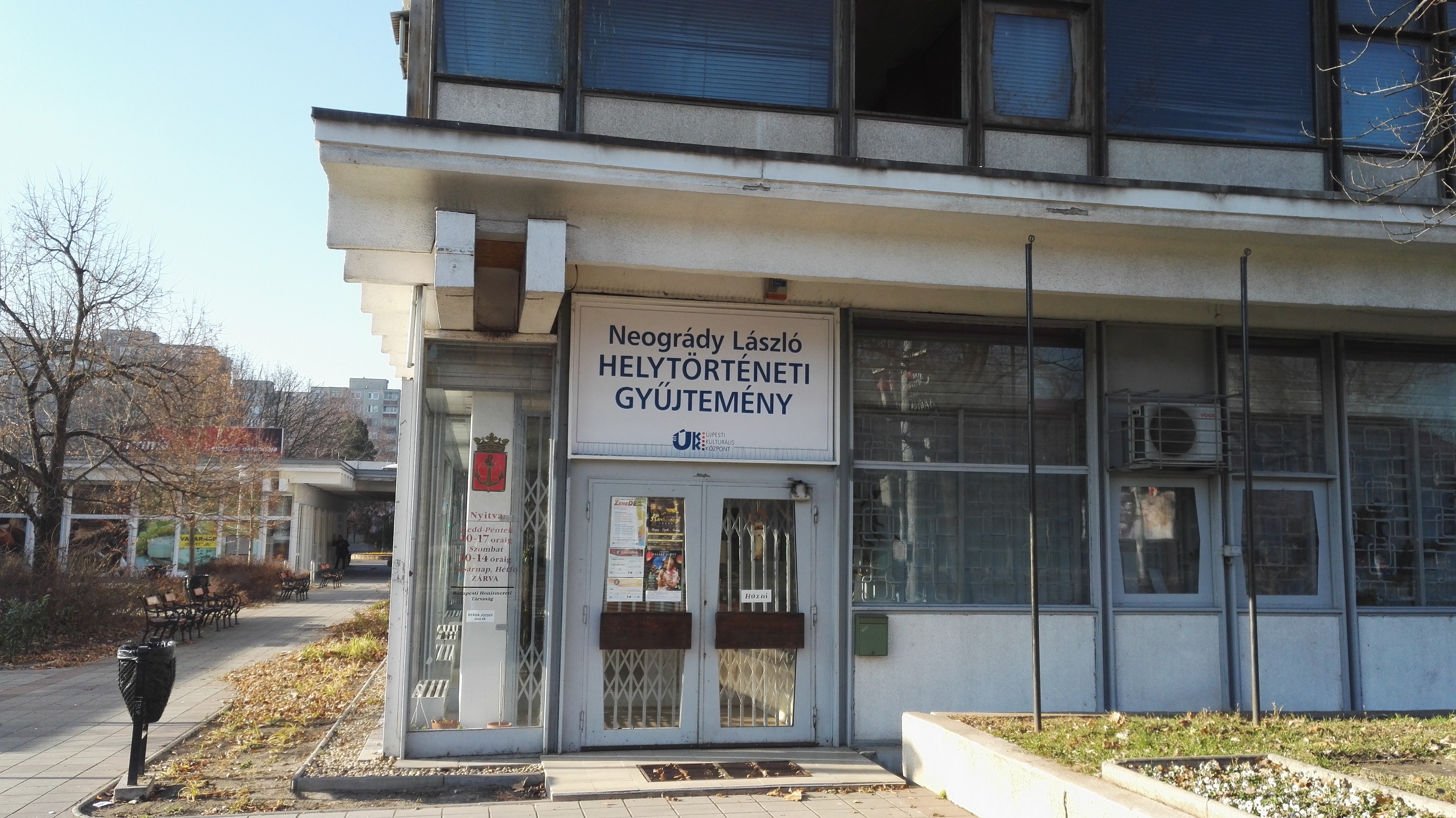 Újpest